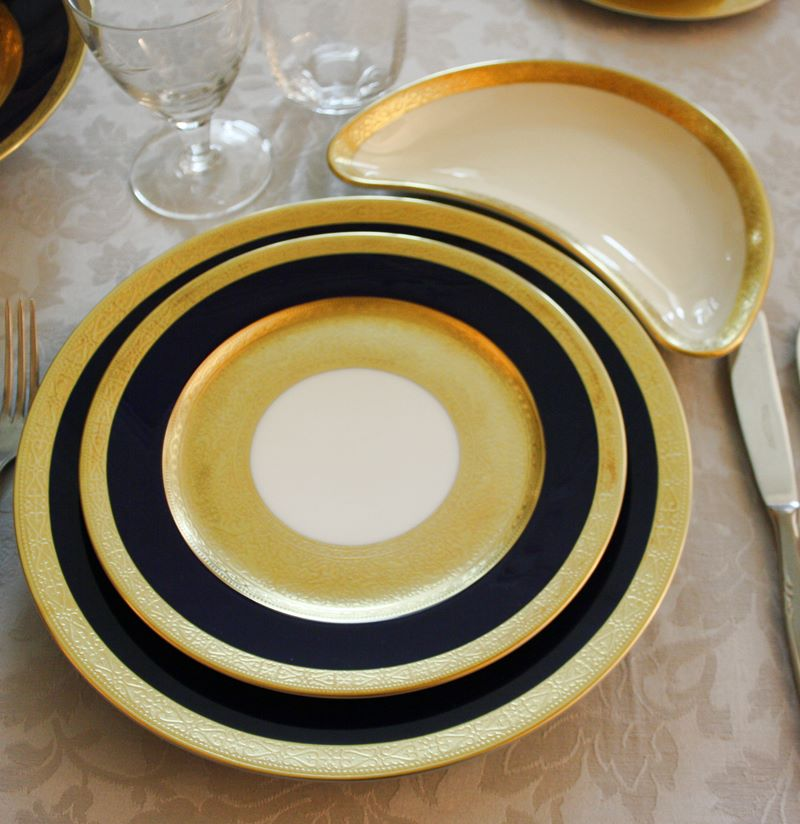 Servizio in oro zecchino - particolare - esposto c/o la mostra "A Tavola con Costantini" Biblioteca di Laveno Mombello 2-30 maggio 2015